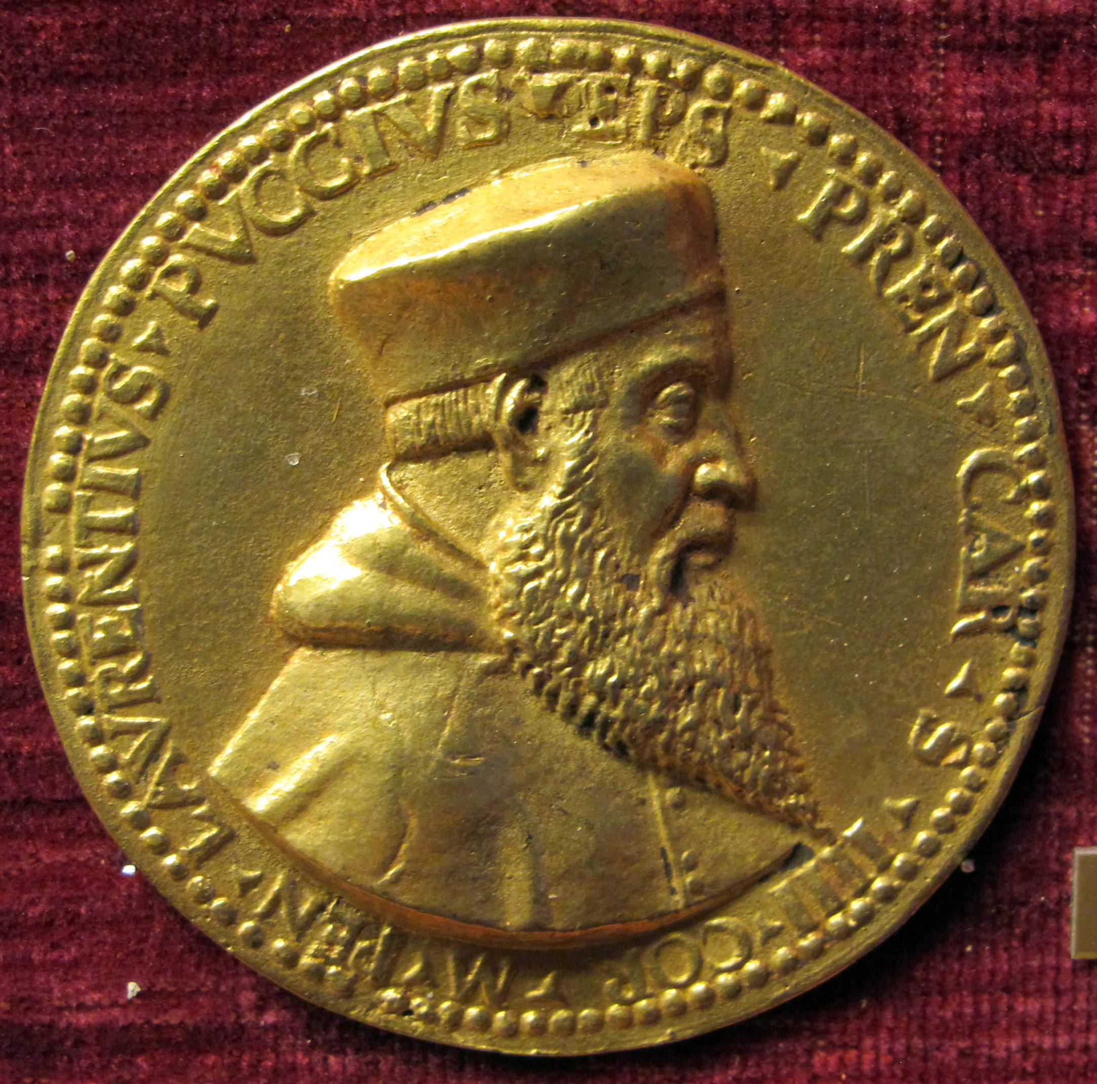 Scuola fiorentina del 1480-1510 ca, medaglia di Lorenzo Pucci (cardinale) (bronzo dorato)